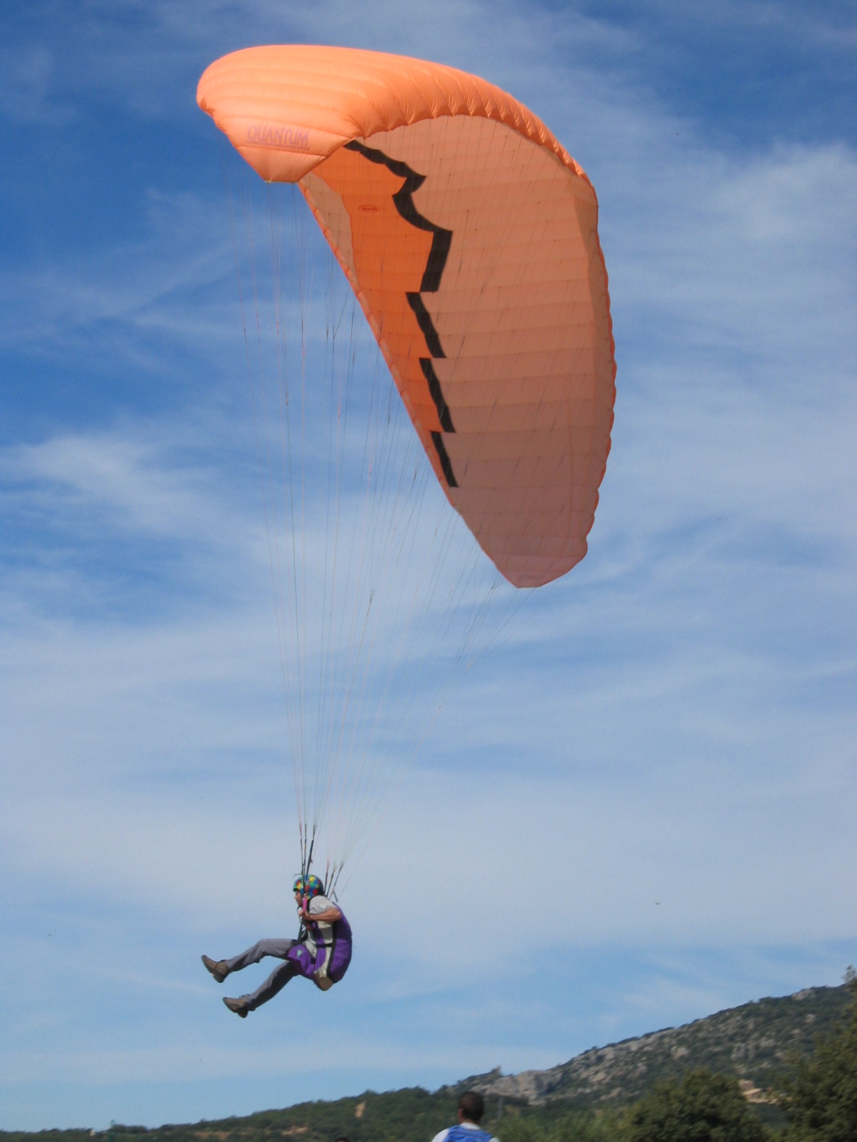 Vol en parapent a Àger (La Noguera) del 12-09-2003. Foto feta per Joan Inglada Paraglider: Edel Quantum